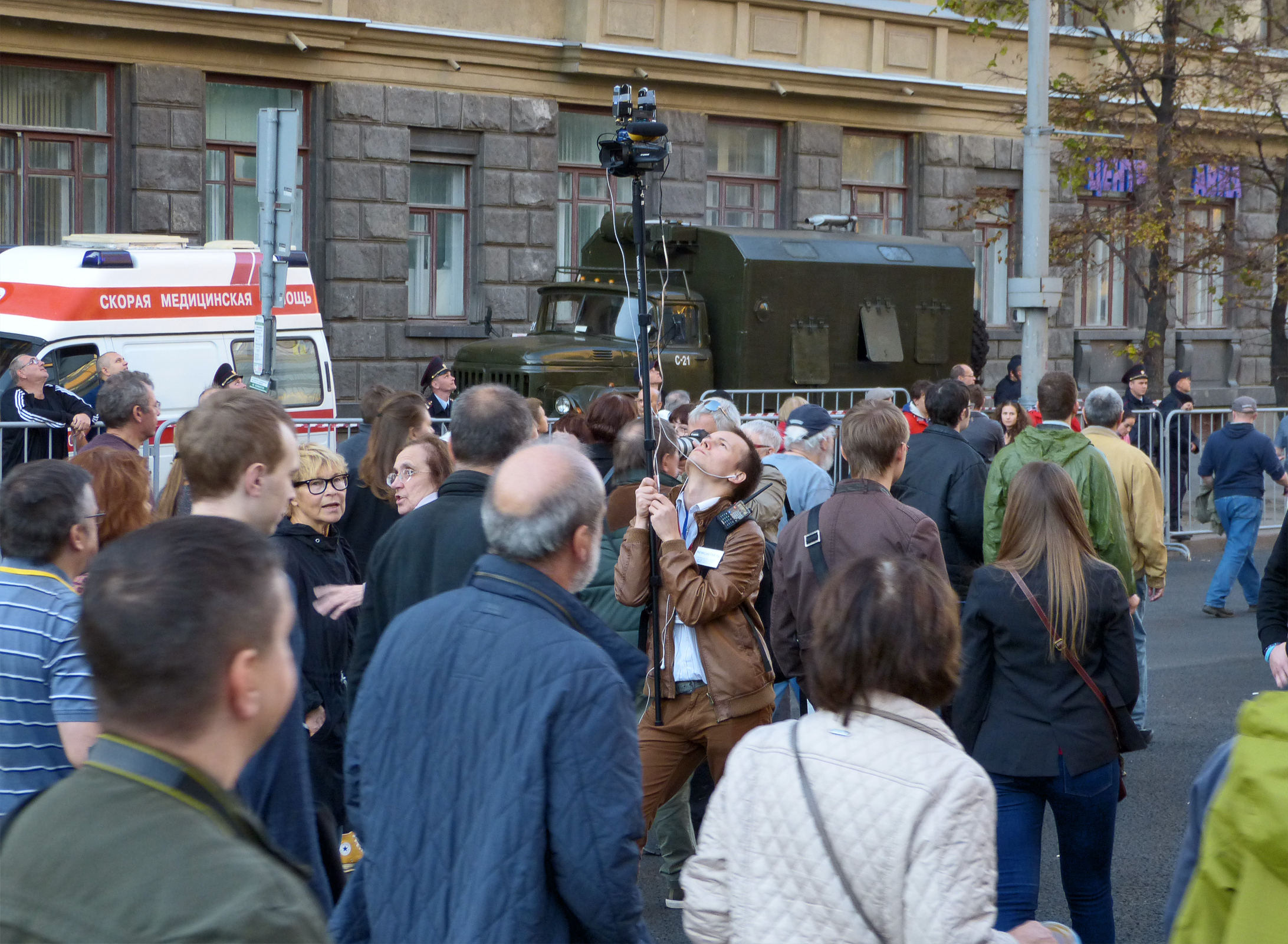 Грандиозный ОБЩЕРОССИЙСКИЙ МАРШ МИРА — против вторжения войск путинского режима на Украину, против сатанинской лжи путинской пропагандистской машины, разжигающей ненависть между людьми, народами, странами. Москва, проспект Академика Сахарова, 21 сентября 2014 года.